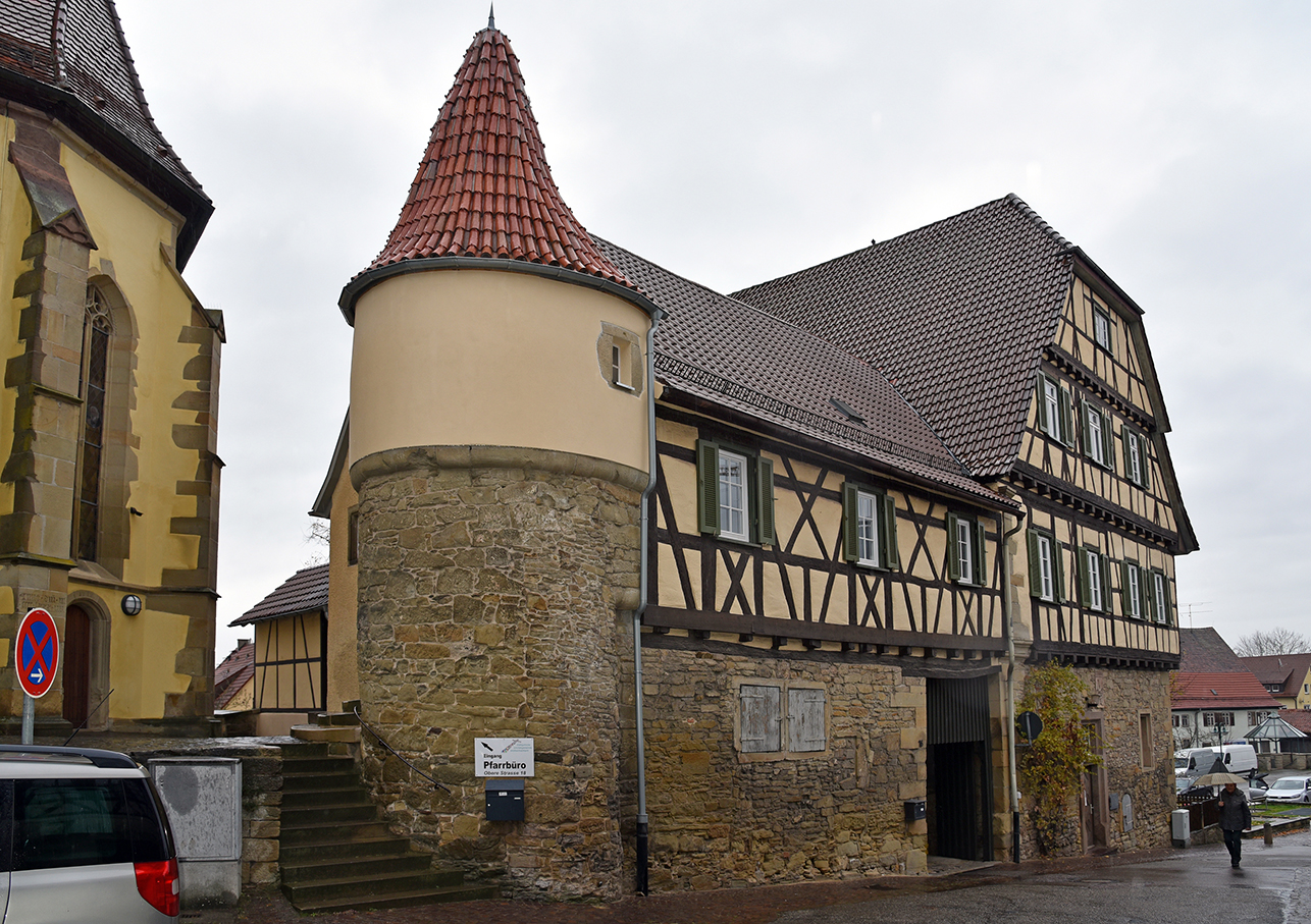 Ehemalige Vogtei, heute Pfarrhaus bei der Stadtkirche in Großsachsenheim